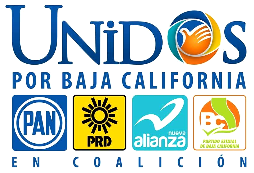 Logotipo Oficial de la Alianza Unidos por Baja California